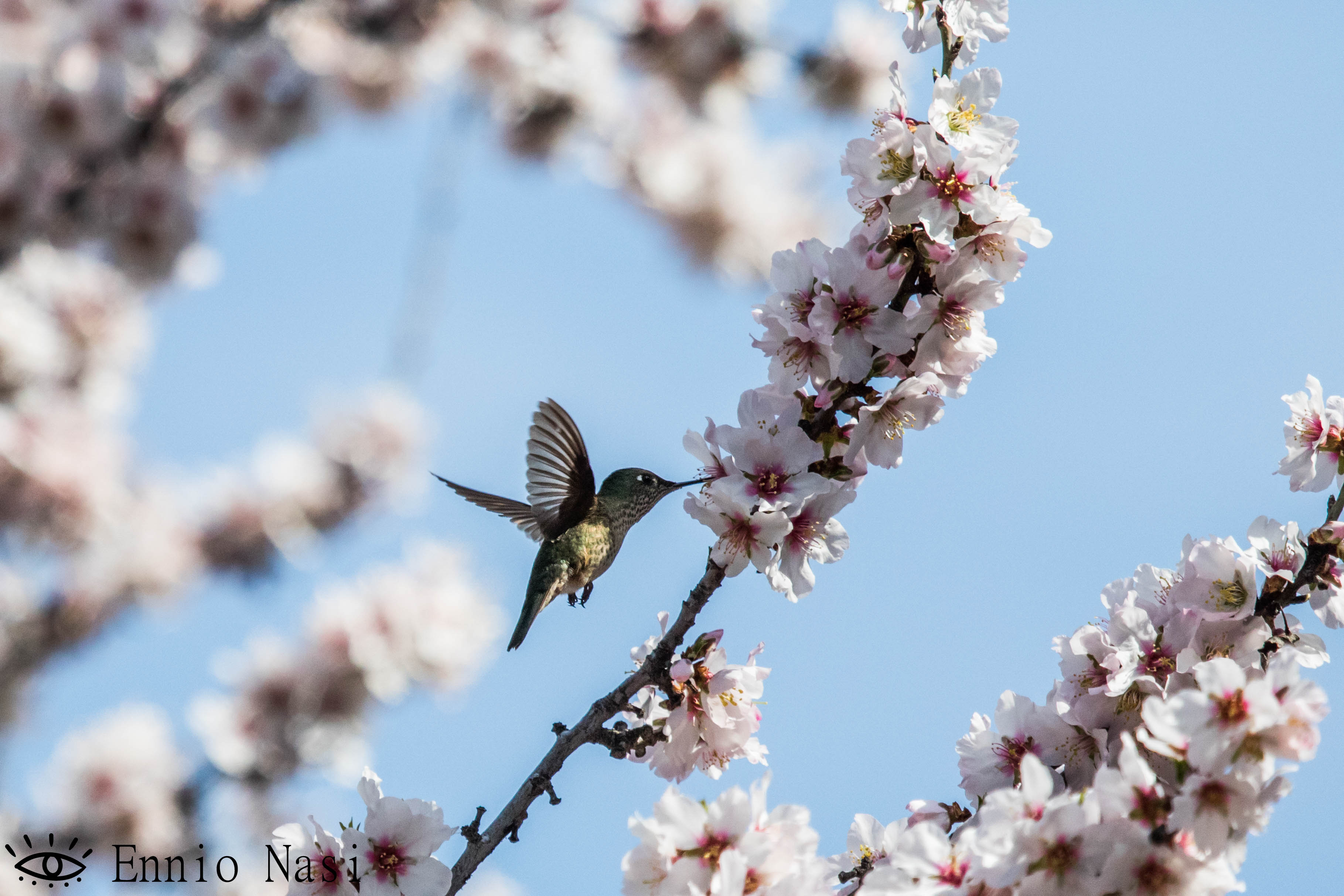 Colibrí austral alimentándose de flores de almendro.